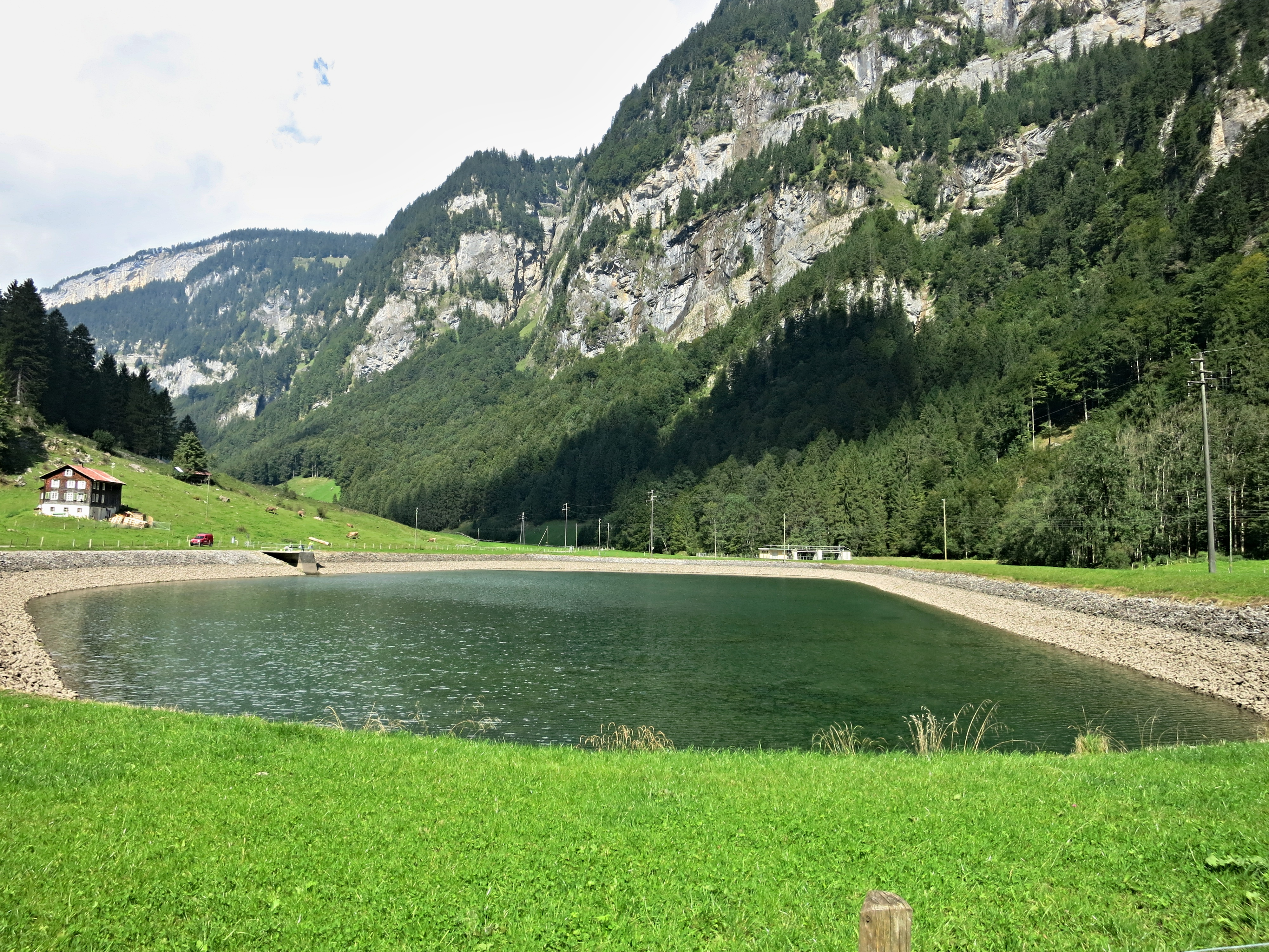 Riedplätz Ausgleichsbecken